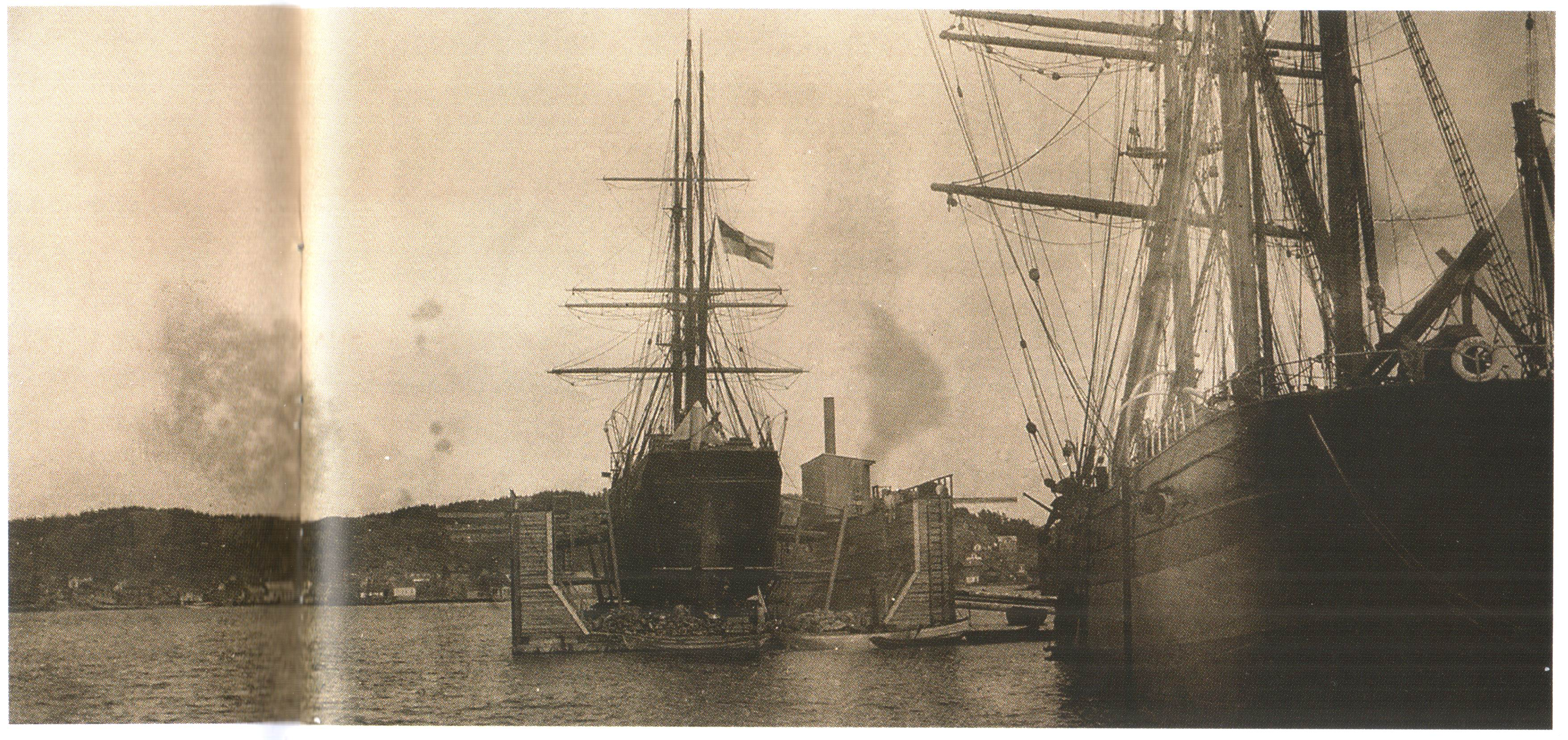 Яхта "Заря" в норвежском доке.